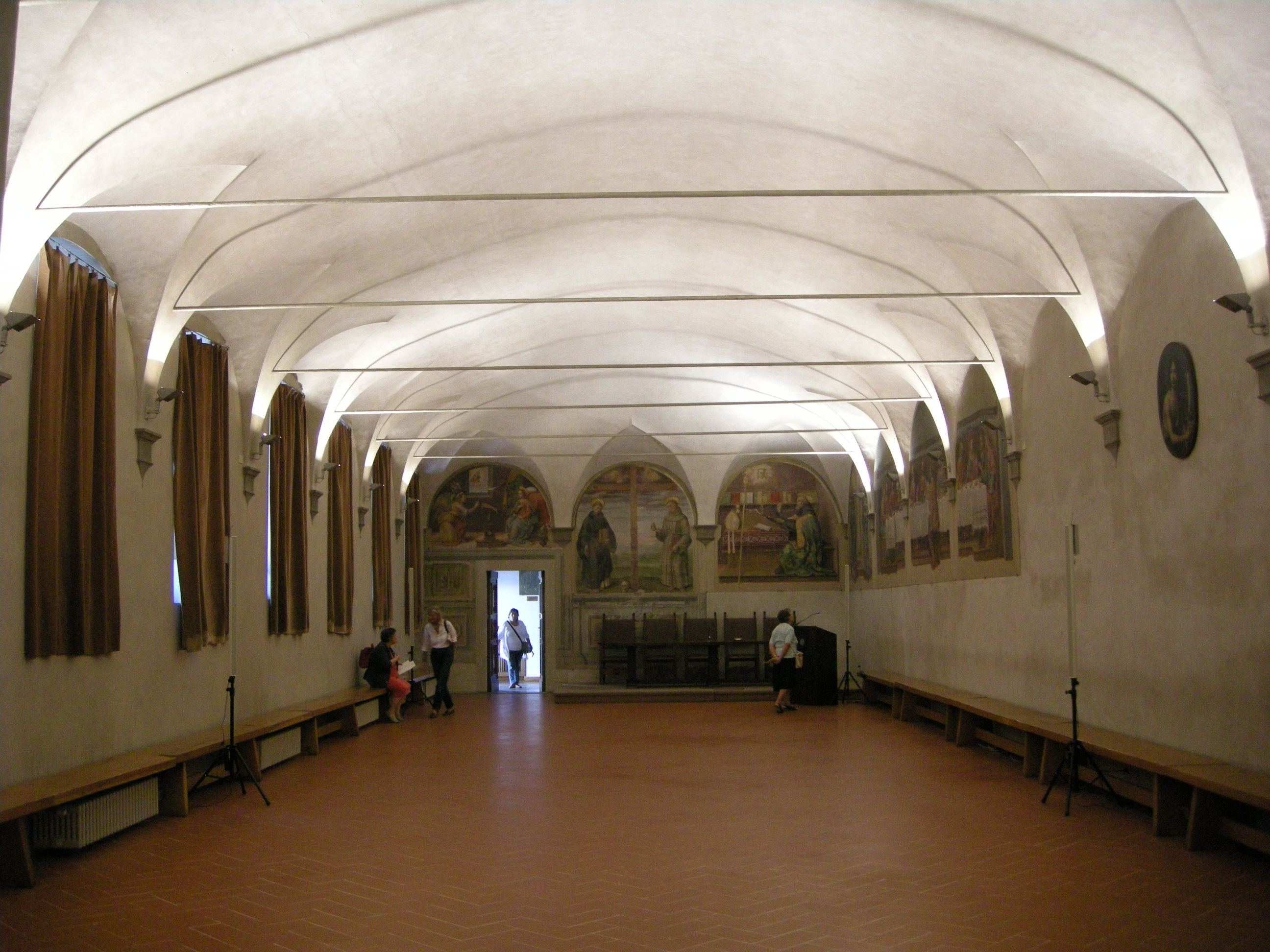 Santa maria a candeli, refettorio